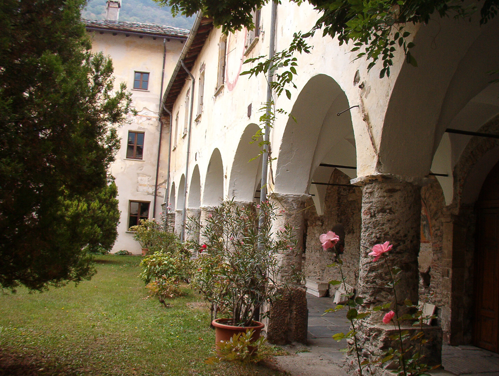 Abbazia di Novalesa - Provincia di Torino - Italy